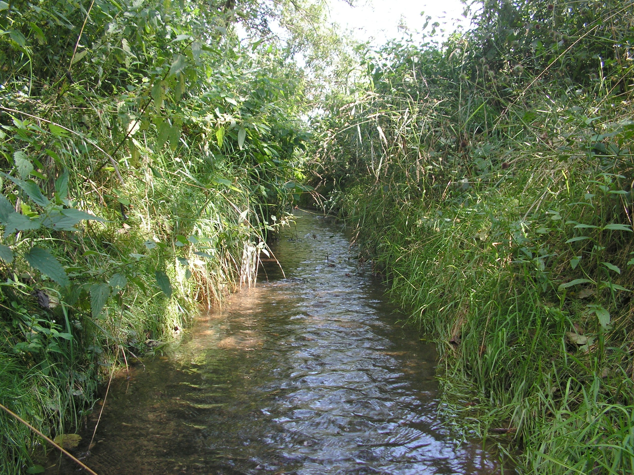 Potok Radinovka několik metrů před ústím do říčky Sázavky.